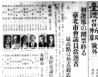 1935年台灣日日新報頭版。資料來源：「台灣西方文明初體驗」，陳柔縉，2005，麥田出版社。